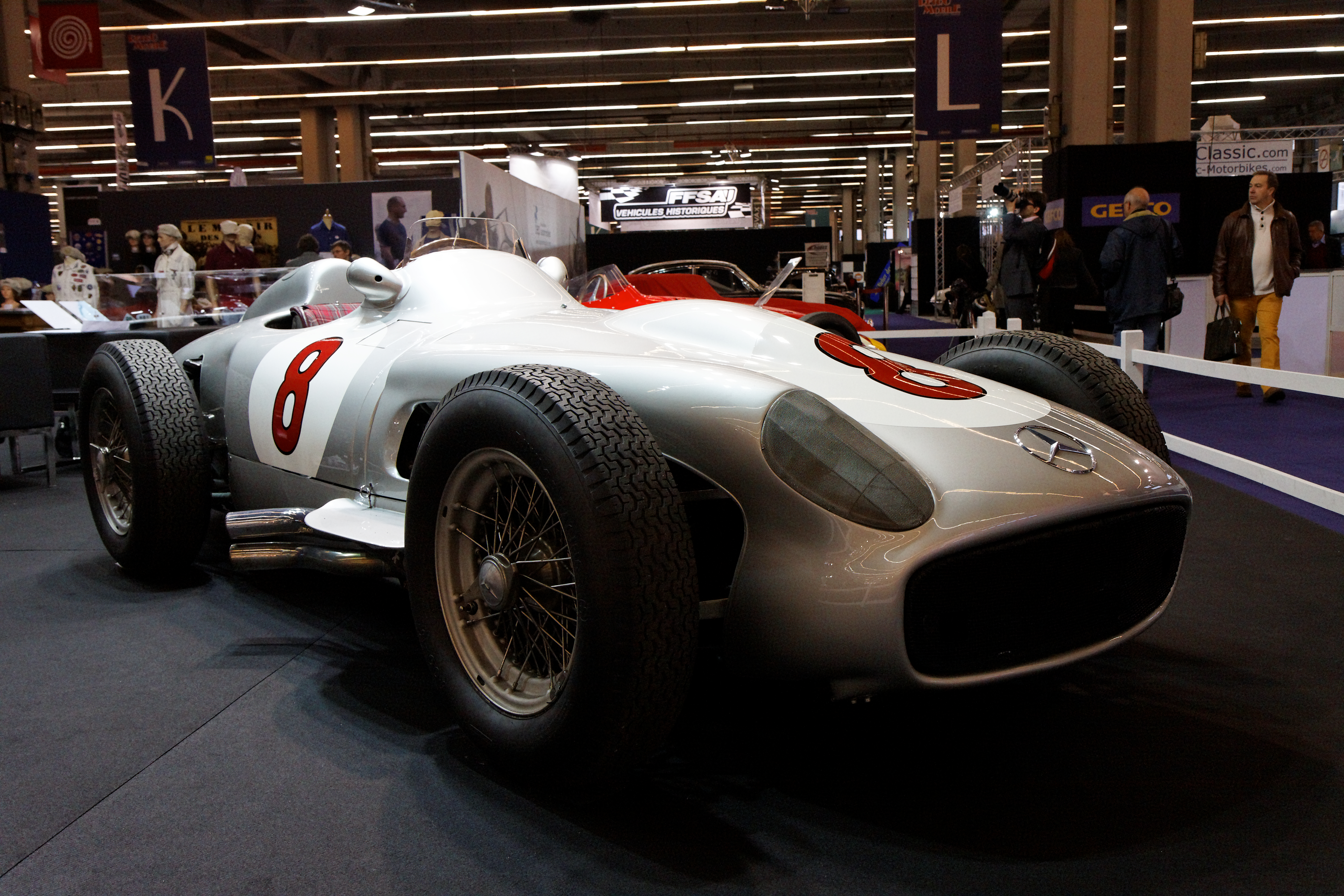 Photographie prise lors du salon rétromobile 2011 à Paris, porte de Versailles.